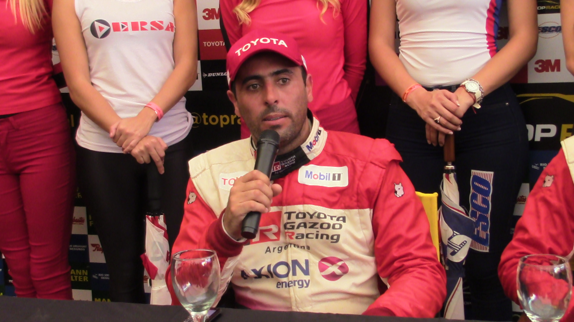 Gabriel Ponce de León, piloto argentino de automovilismo de velocidad. Tricampeón de Turismo Competición 2000.